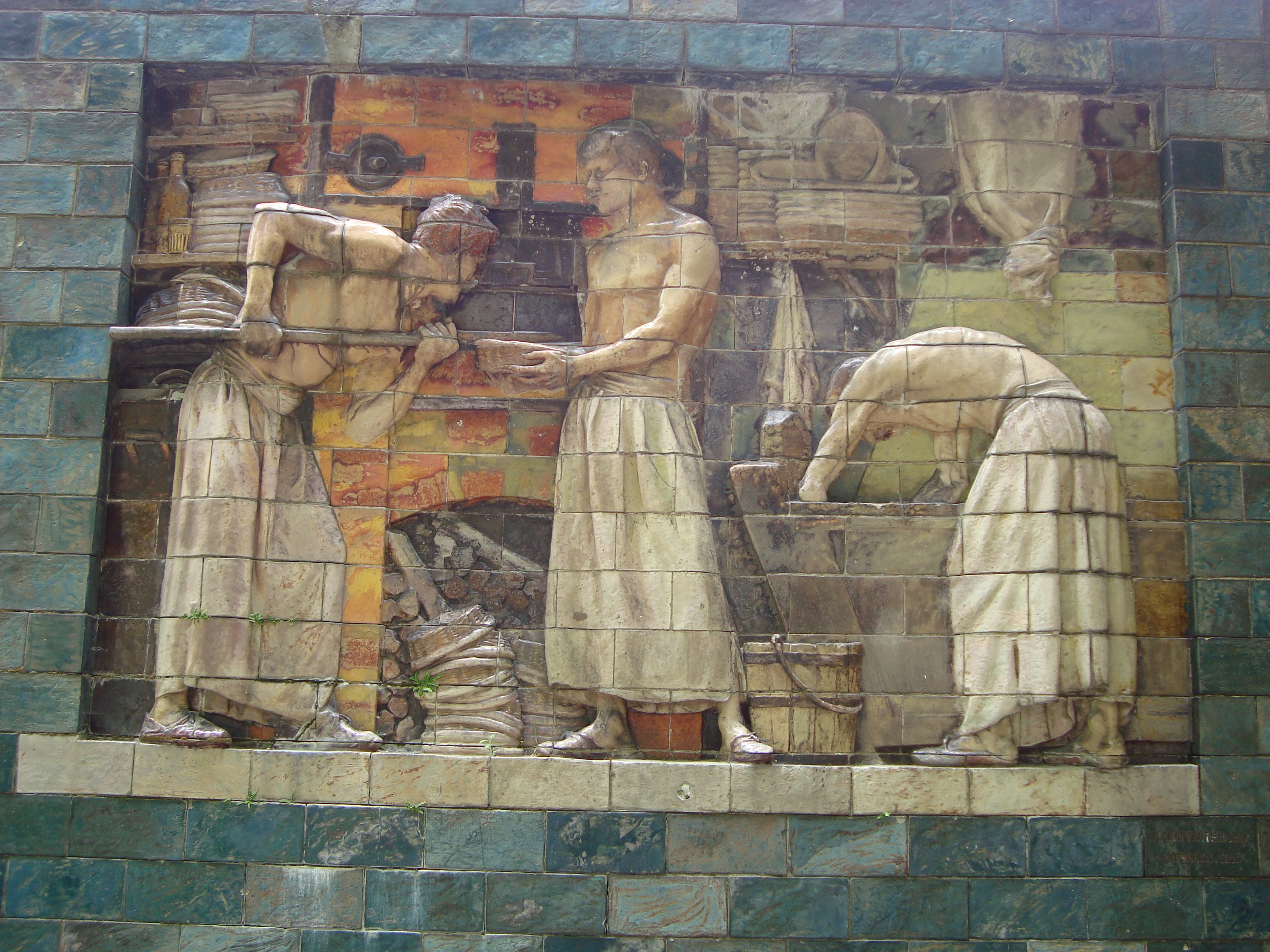 Bas relief en grès émaillé intitulé Les Boulangers exécuté en 1897 par Alexandre Charpentier (1856-1909) d'après le céramiste Émile Muller (1823-1889), square Scipion dans le 5e arrondissement de Paris